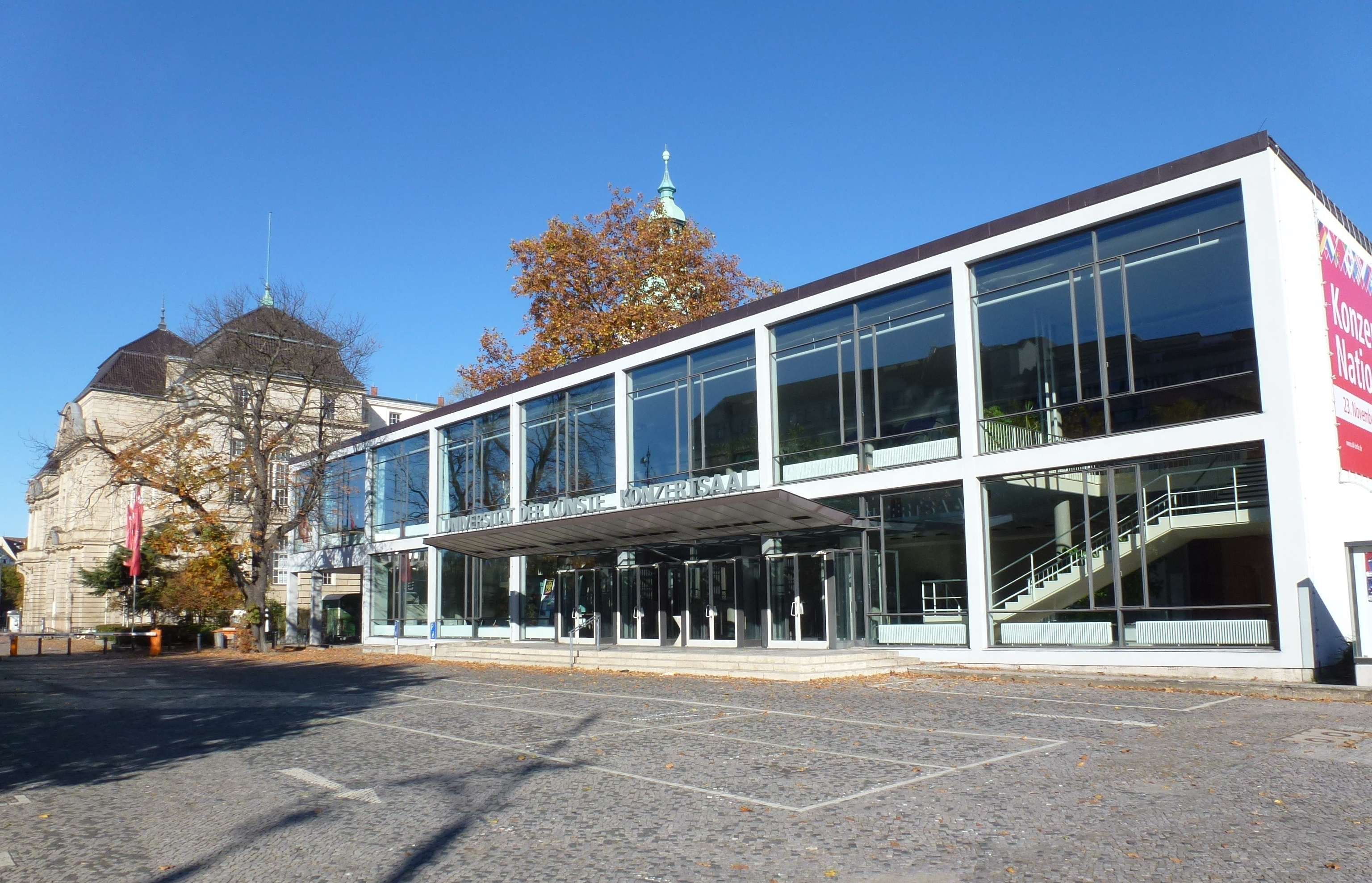 Berlin, Konzertsaal der Universität der Künste, 1952—1954, Architekt: Paul Gotthilf Reinhold Baumgarten, Fasanenstraße Ecke Hardenbergstraße, Berlin-Charlottenburg